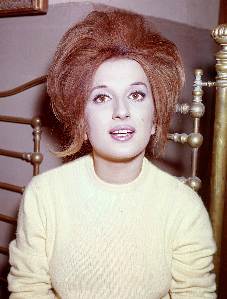 Italian singer Mina (Mina Anna Maria Mazzini)